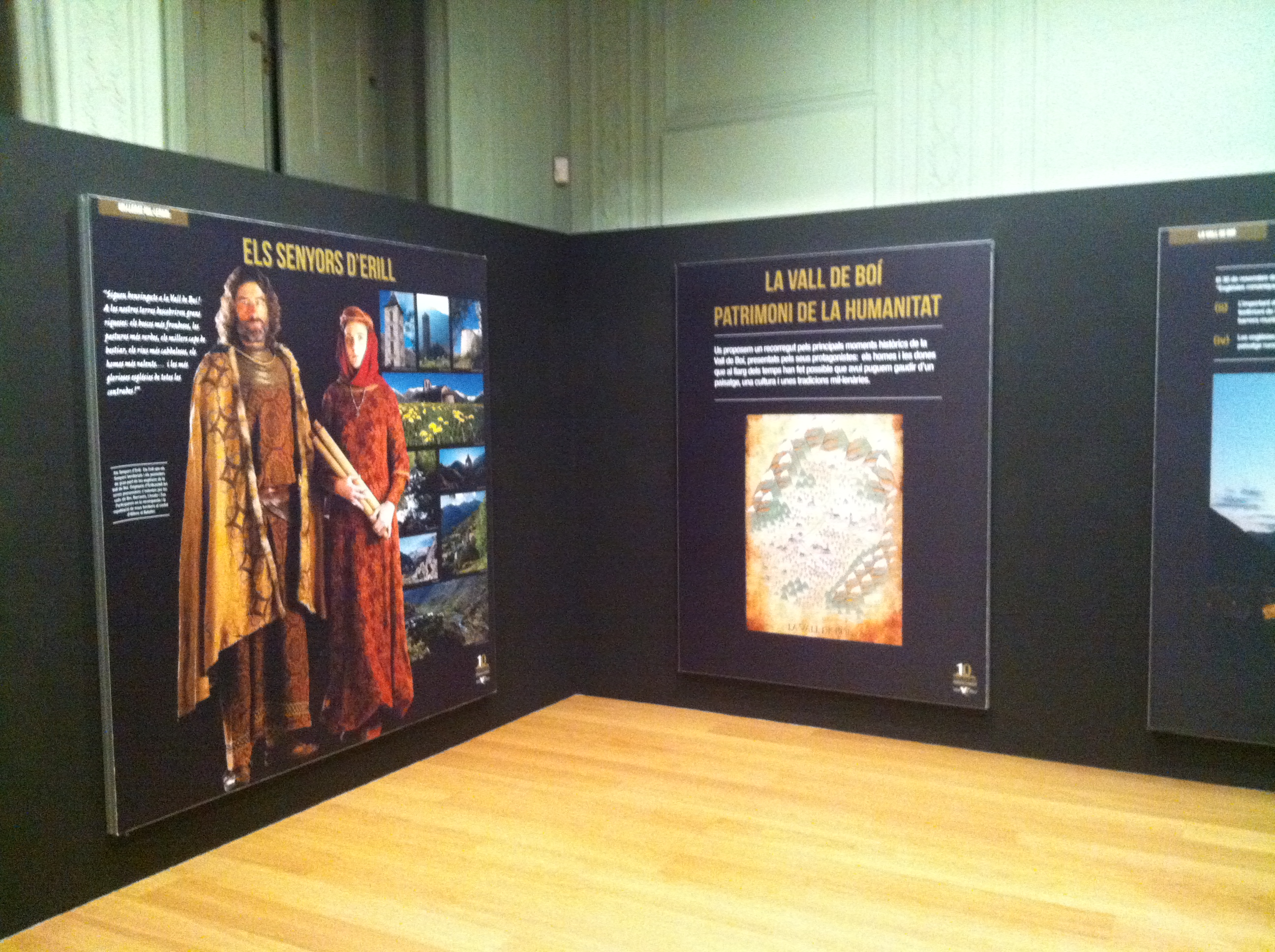 Palau Robert- Expo sobre la La Vall de Boí